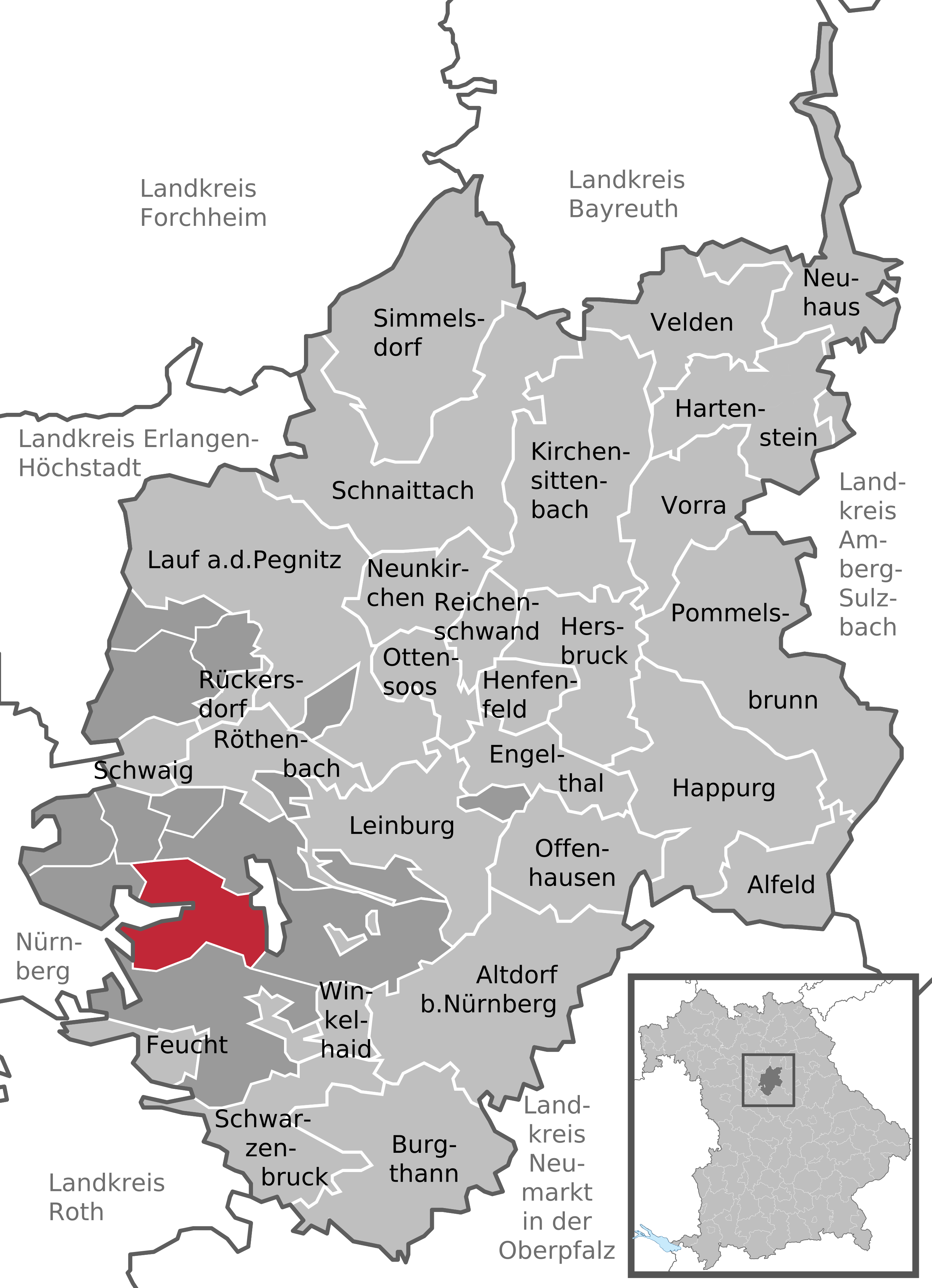 Positionskarte des gemeindefreien Gebietes Fischbach